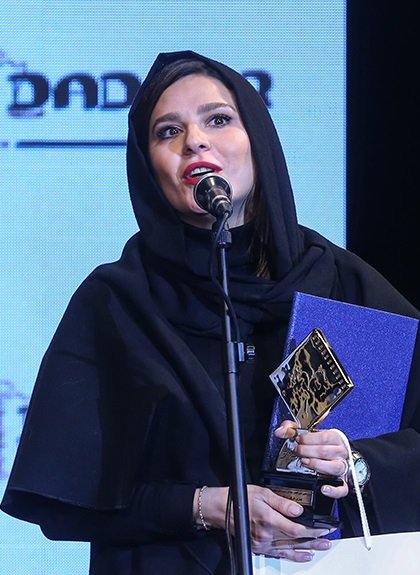 سحر دولتشاهی در دوازدهمین جشن منتقدان سینمای ایران